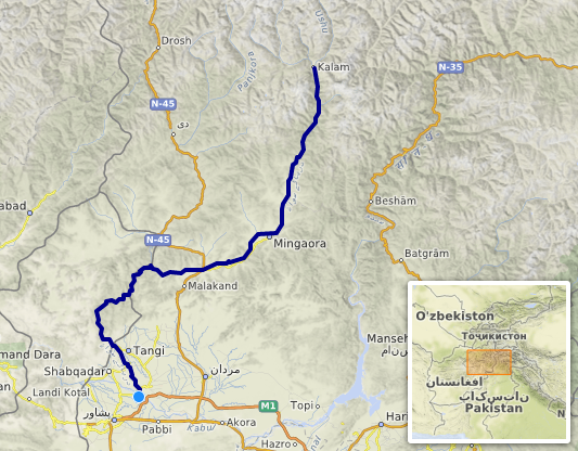 carte réalisée sur umap [1] This map may be incomplete, and may contain errors. Don't rely solely on it for navigation.